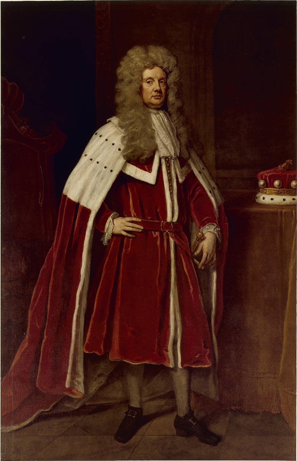 oilmedium QS:P186,Q296955